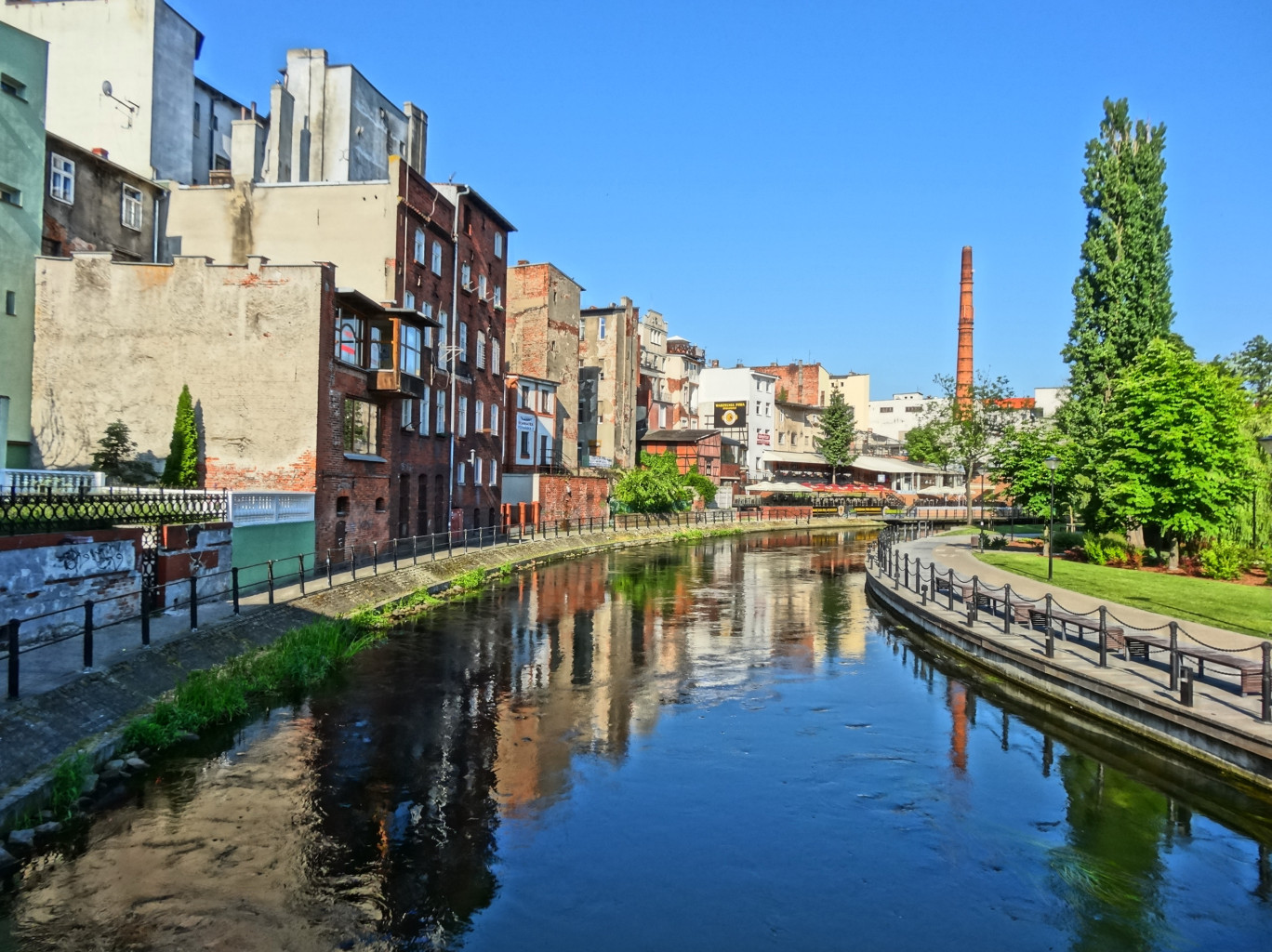 Wenecja Bydgoska – zespół architektoniczny Starego Miasta w Bydgoszczy zbudowany bezpośrednio nad rzeką Młynówką.